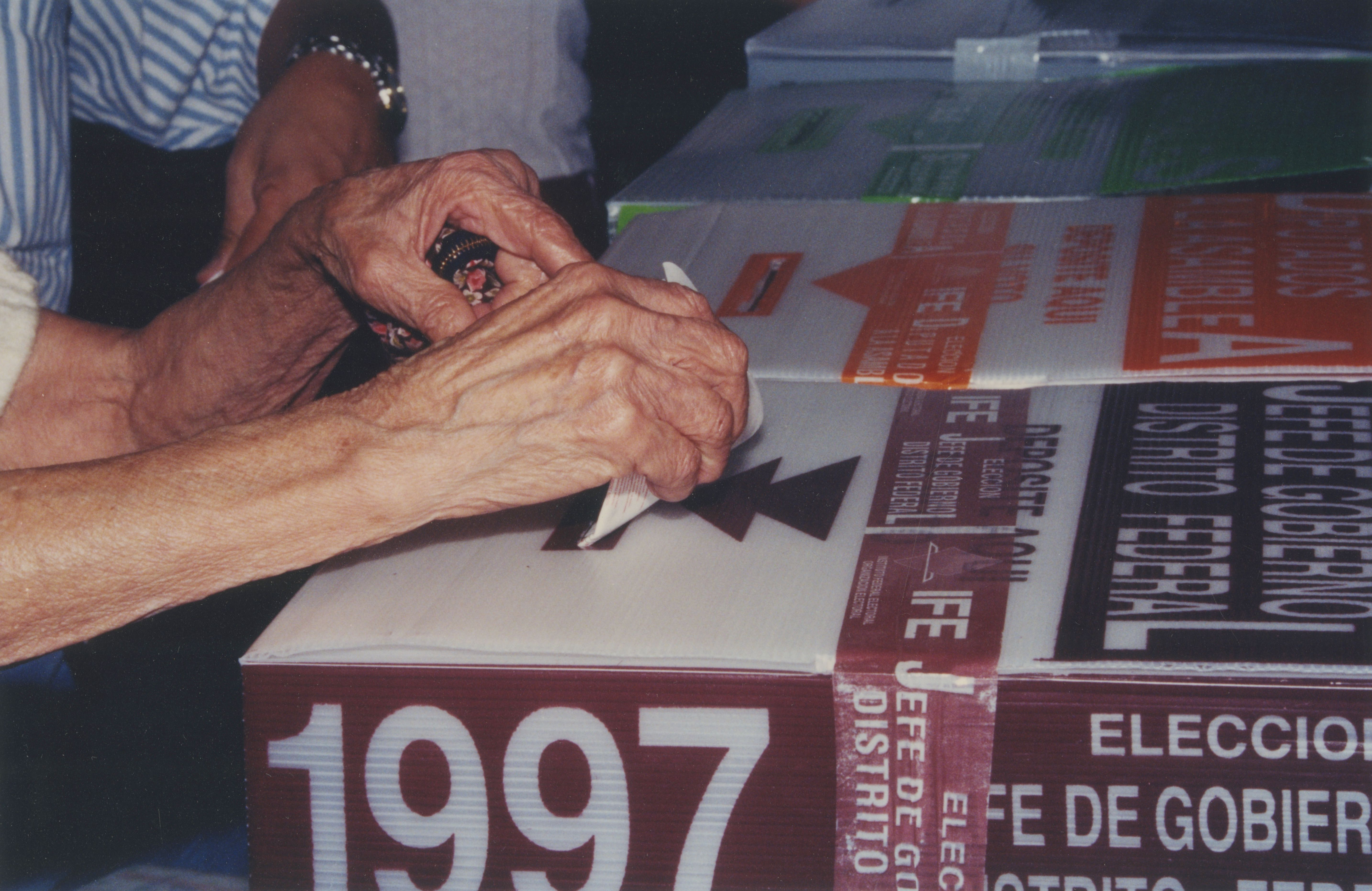 Fotografía antigua de la Ciudad de México resguardadas por el Museo Archivo de la Fotografía (MAF) de la Ciudad de México